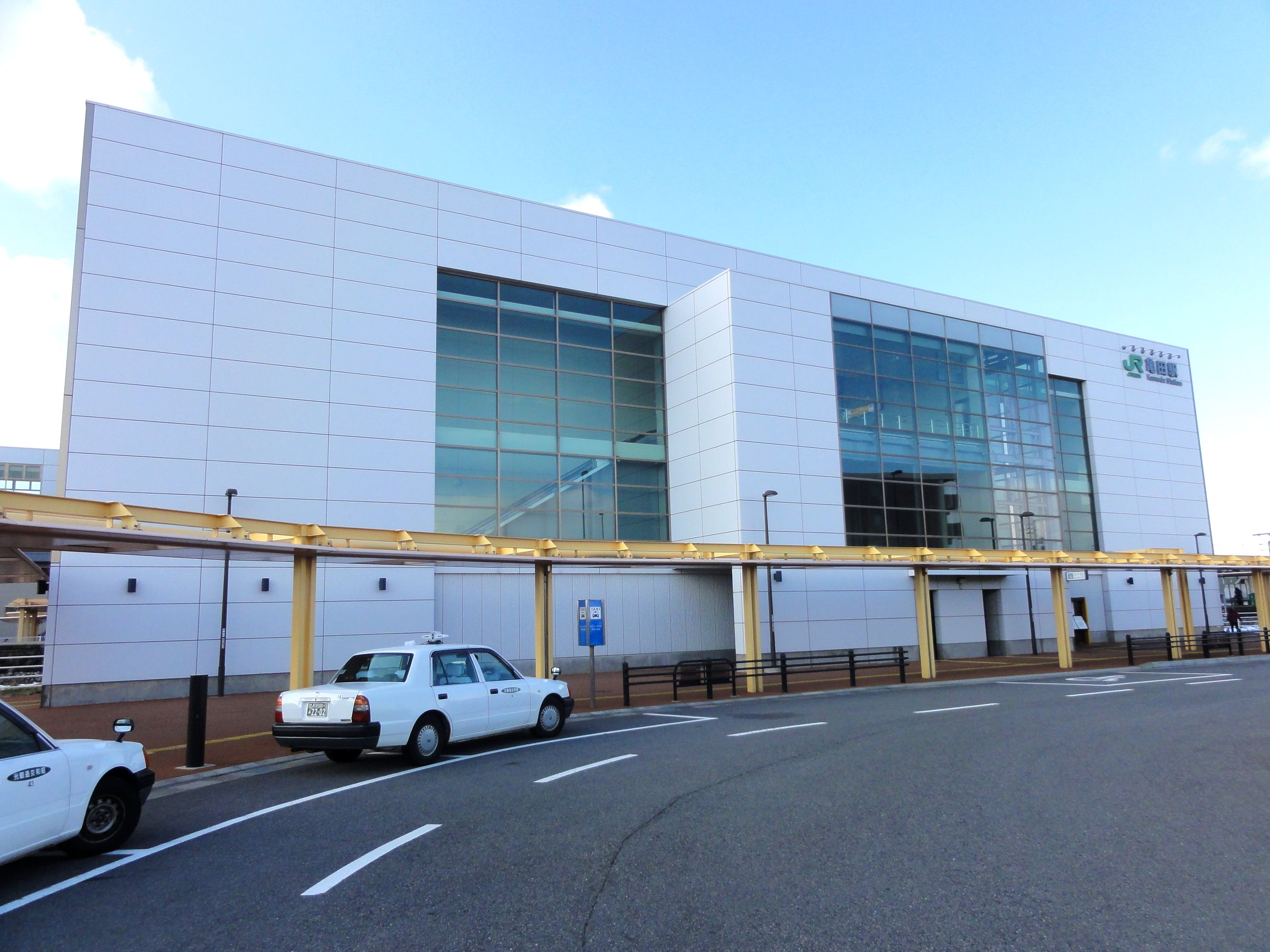 亀田駅